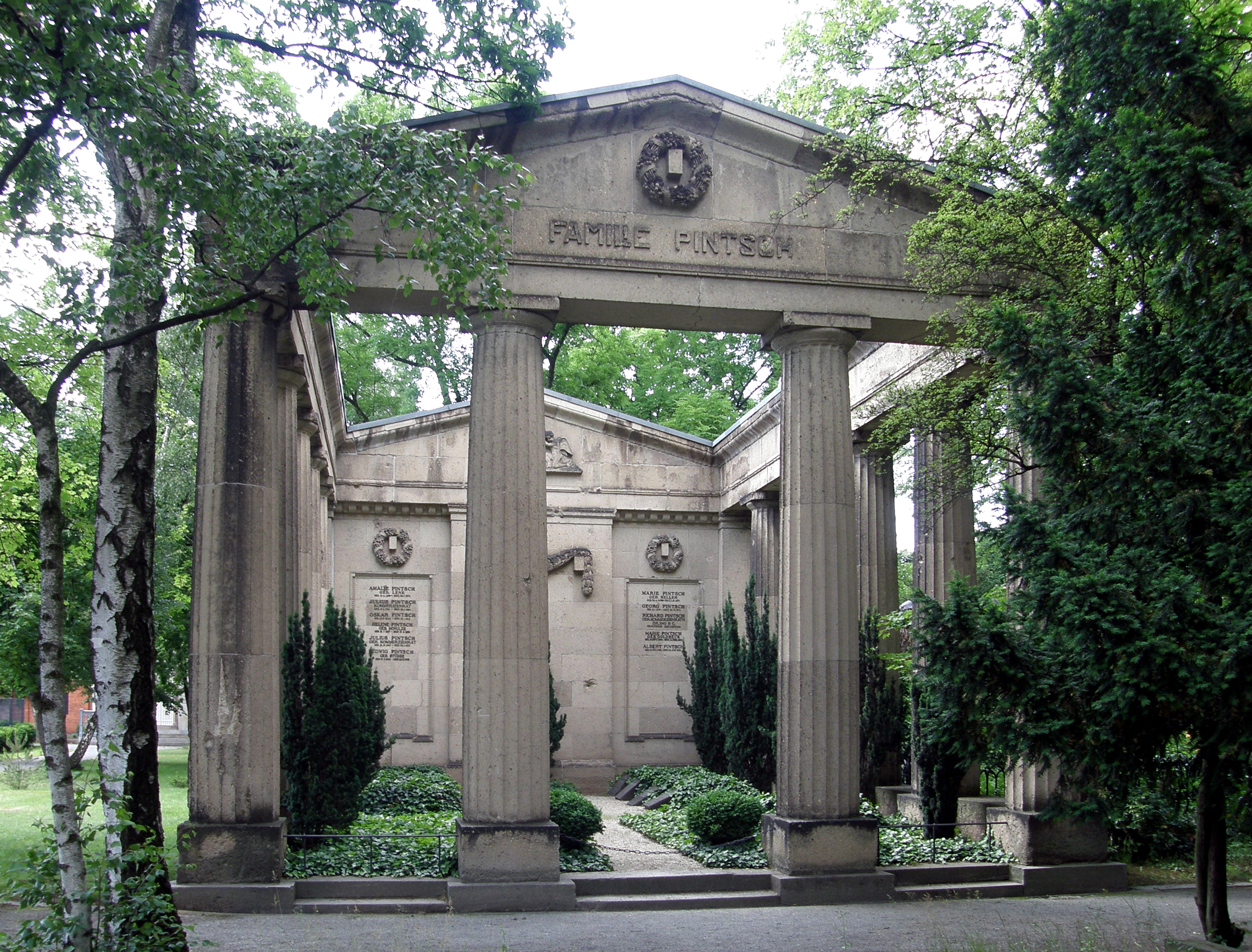 Familiengrab Pintsch auf dem Gerorgen-Parochialfriedhof I in Berlin